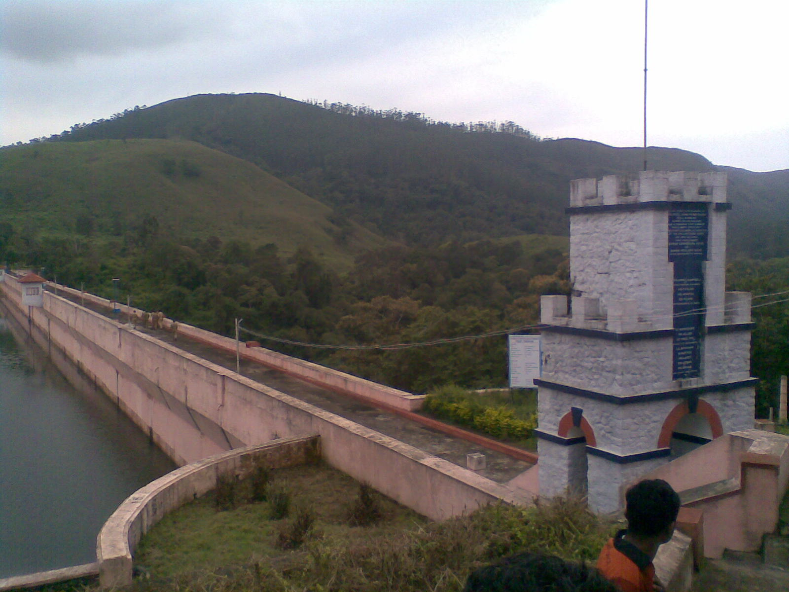 മുല്ലപ്പെരിയാർ ഡാമിന്റെ ദൃശ്യം